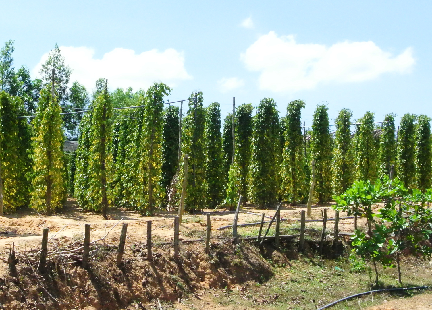 ベトナム、フーコック島のコショウ農場(2015)